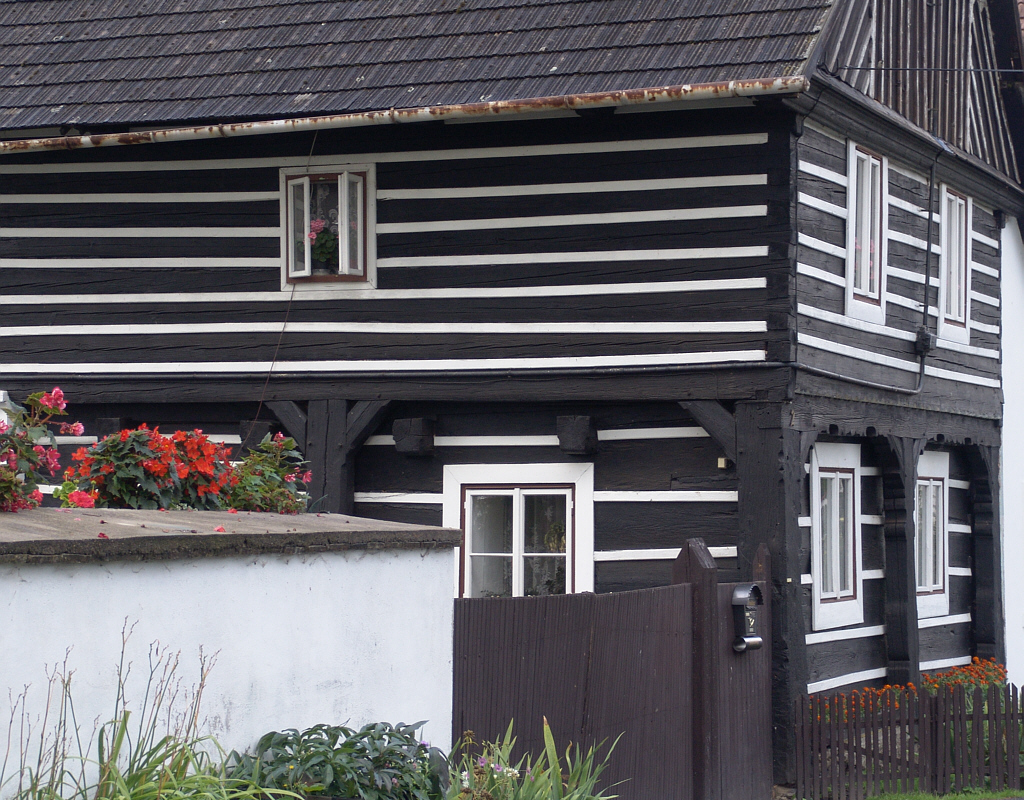 Roubený dům ve Vinném u Ploskovic v Českém středohoří (2005)